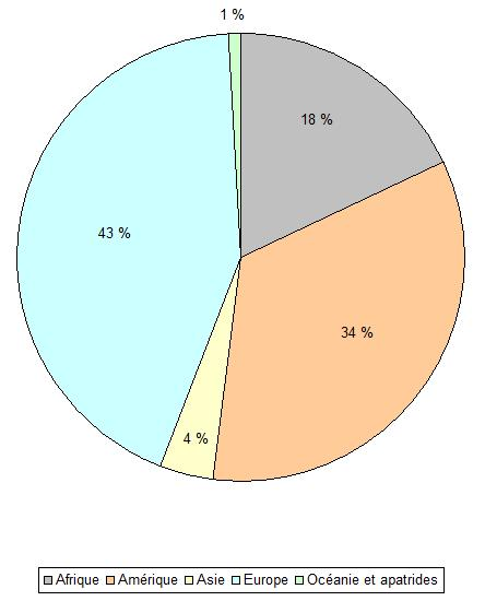 Pourcentage d'étrangers dans la municipalité d'Utrera (Andalousie, Espagne), en 2008.